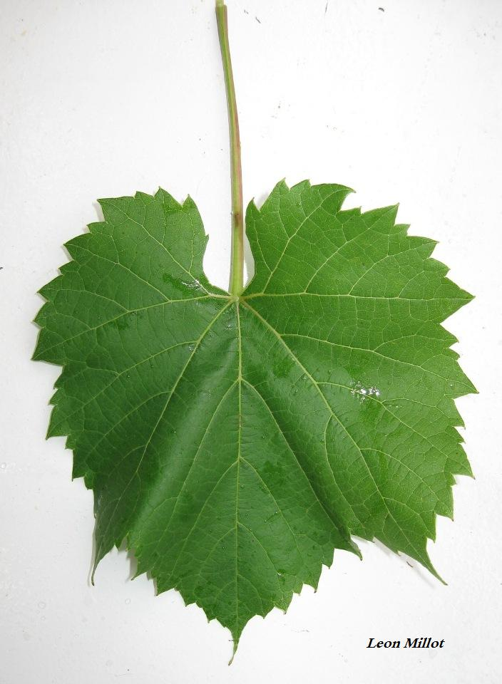 Liść winorośii odmiany Leon Millot